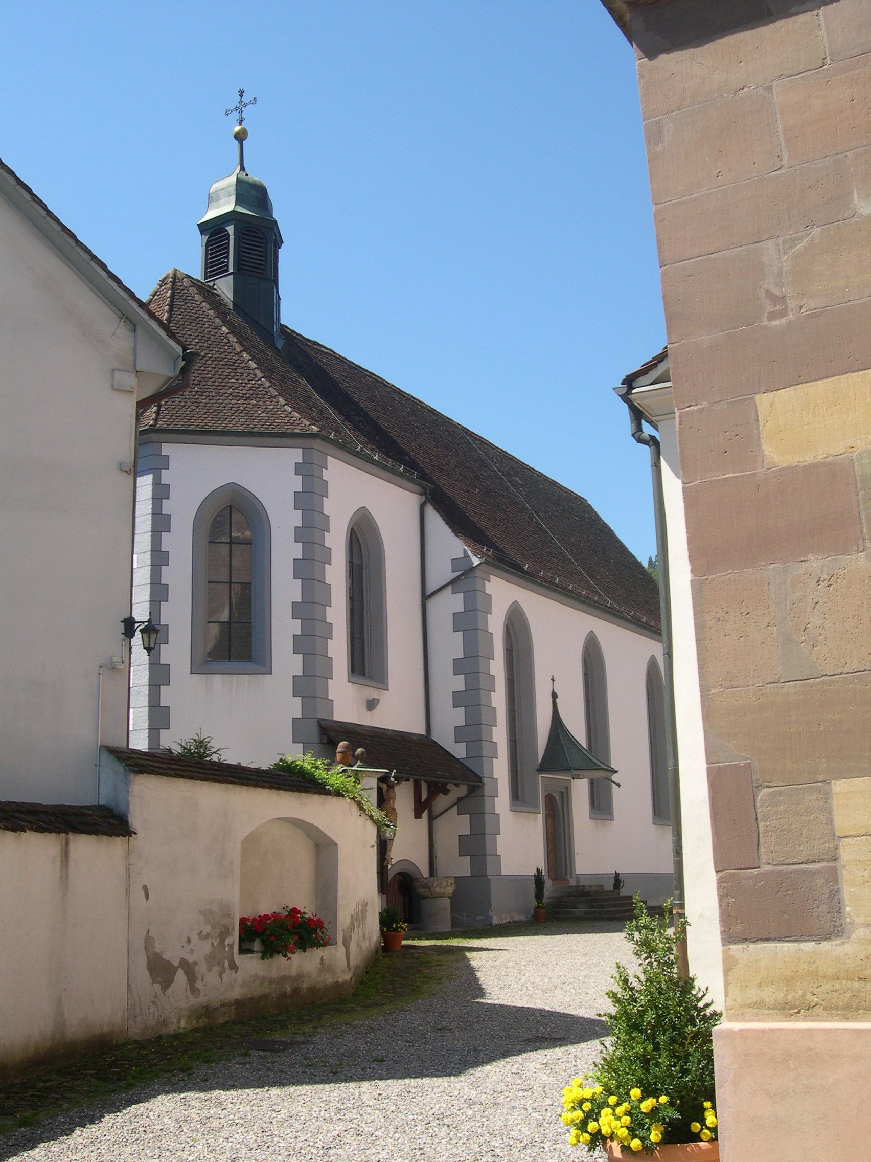 Obere Kirche, ehemalige Pfarrkirche St.Maria. 1529-1725 paritätisch.